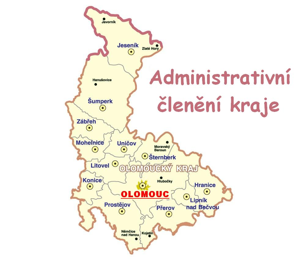 Mapka kraje.